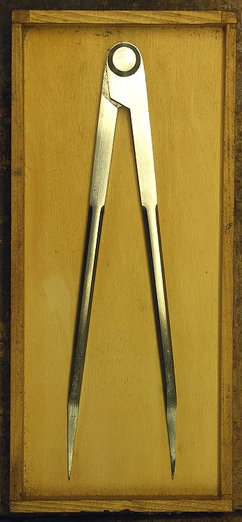 Stechzirkel